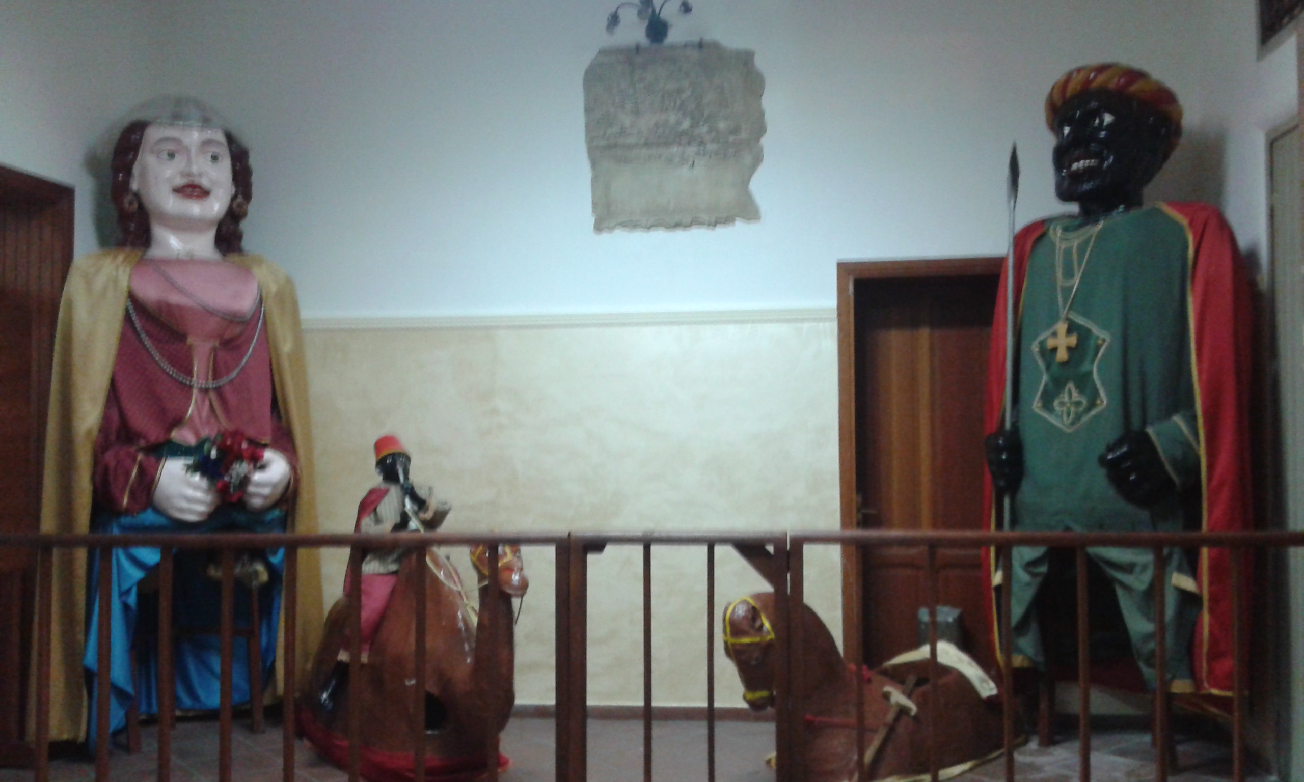 Foto dei Giganti di Seminara "Mata" e Grifone" con cavallo e cammello esposti nel Palazzo Comunale di Seminara